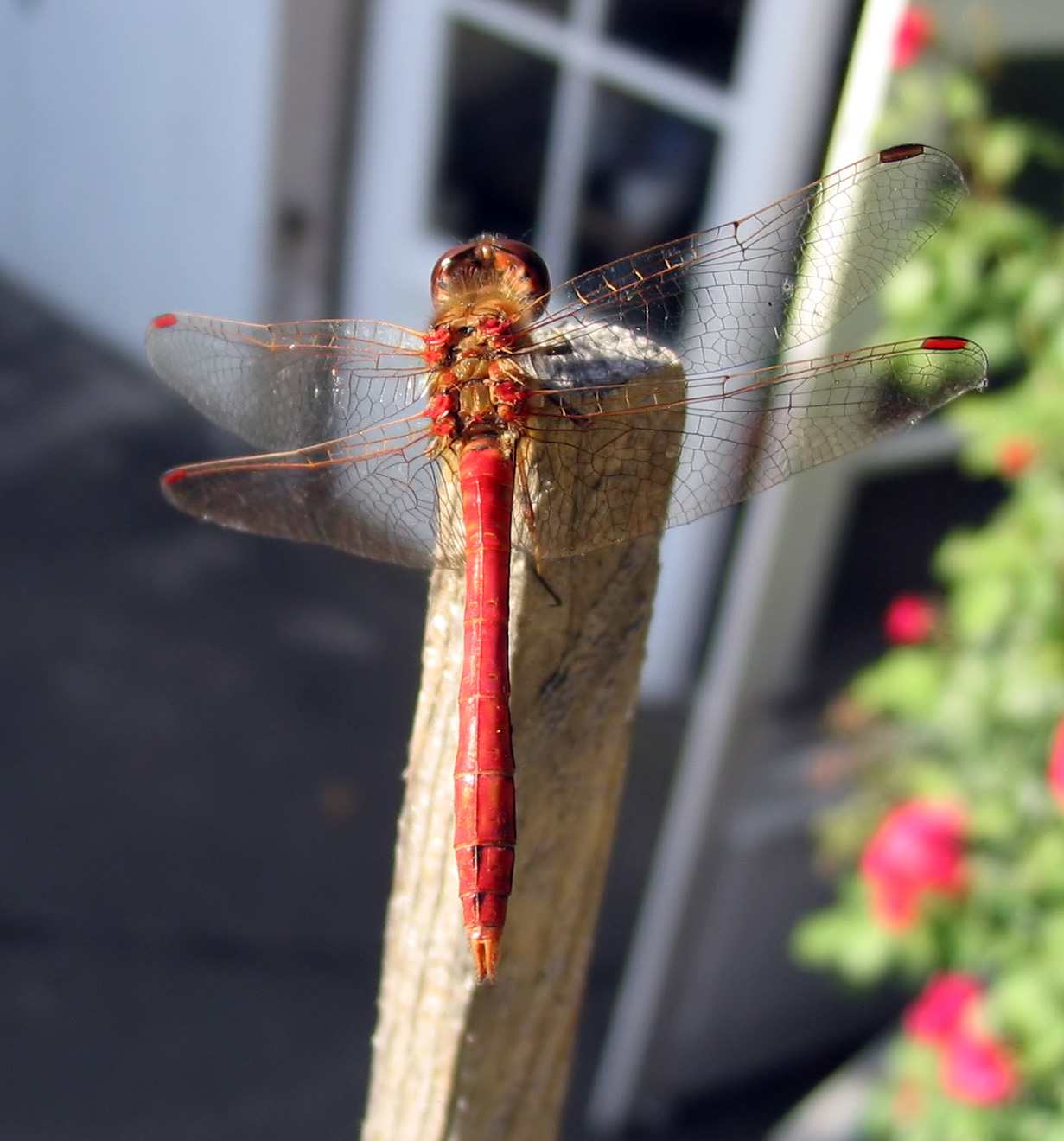 Beschreibung: Gemeine Heidelibelle (Sympetrum vulgatum) / Männchen Fotograf: Darkone, 7. September 2004